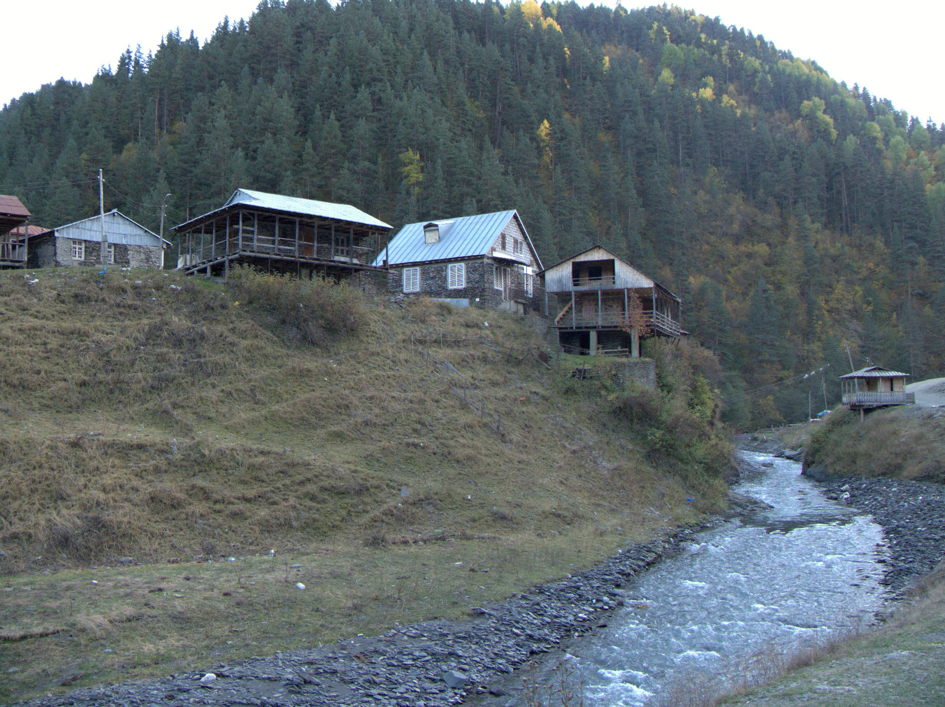 Osada Chiso v údolí Čančachovanské (Chiské) Alazani.